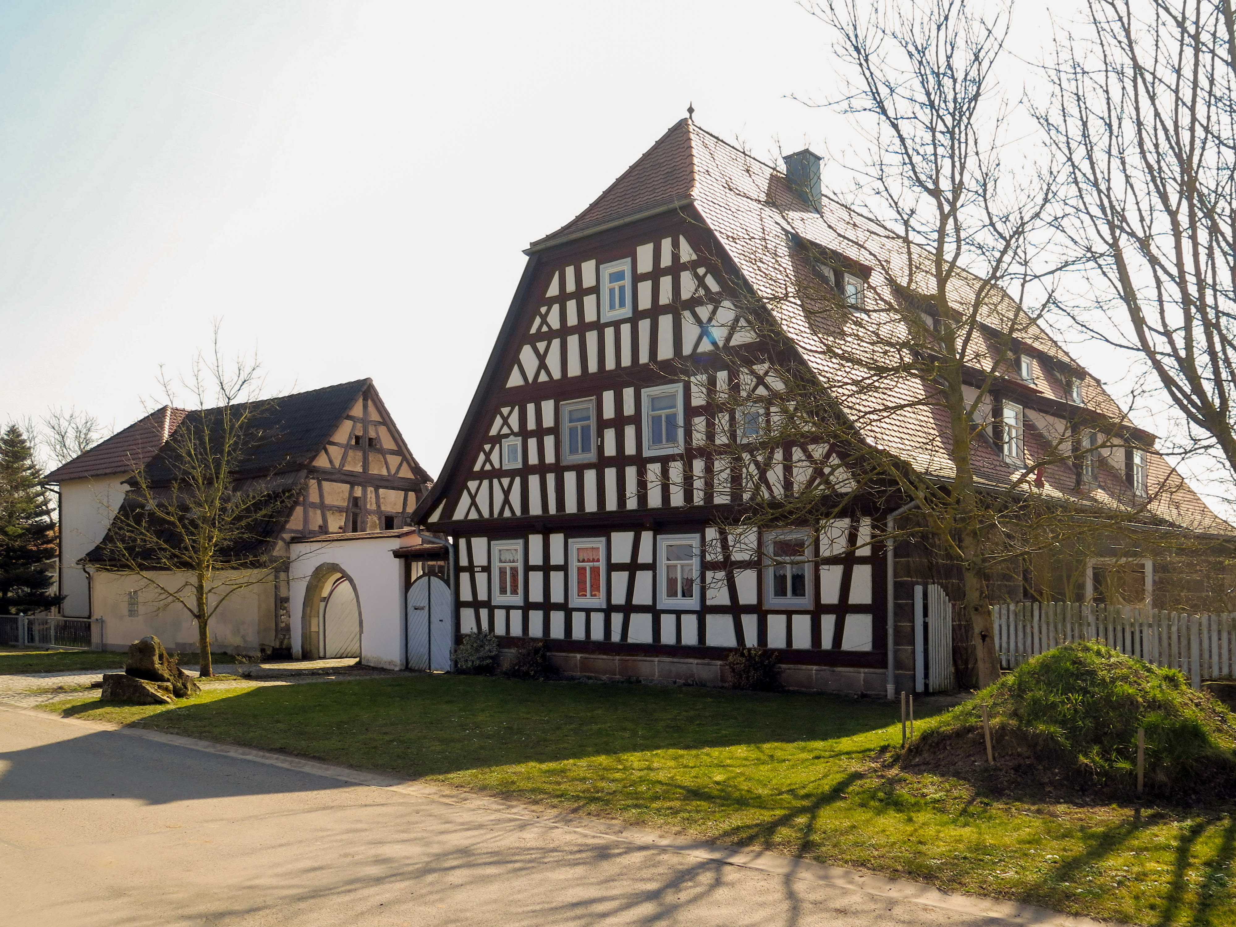 Ehemaliger Brauereigasthof, Zweigeschossiger und giebelständiger Fachwerkbau mit Drittelwalmdach, 1756